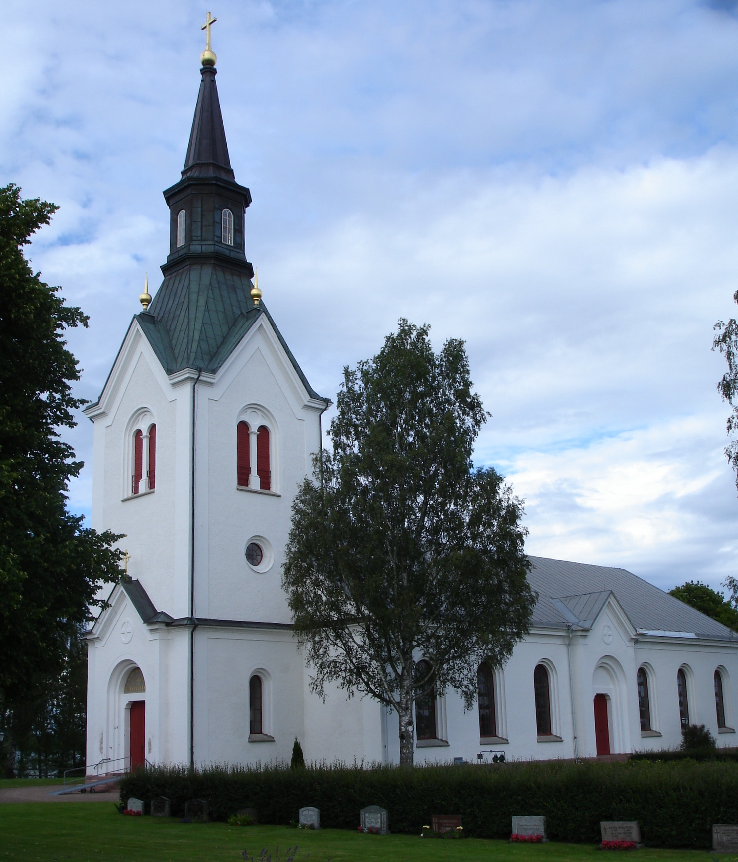 Västra Ryds kyrka i Ydre kommun, Östergötland